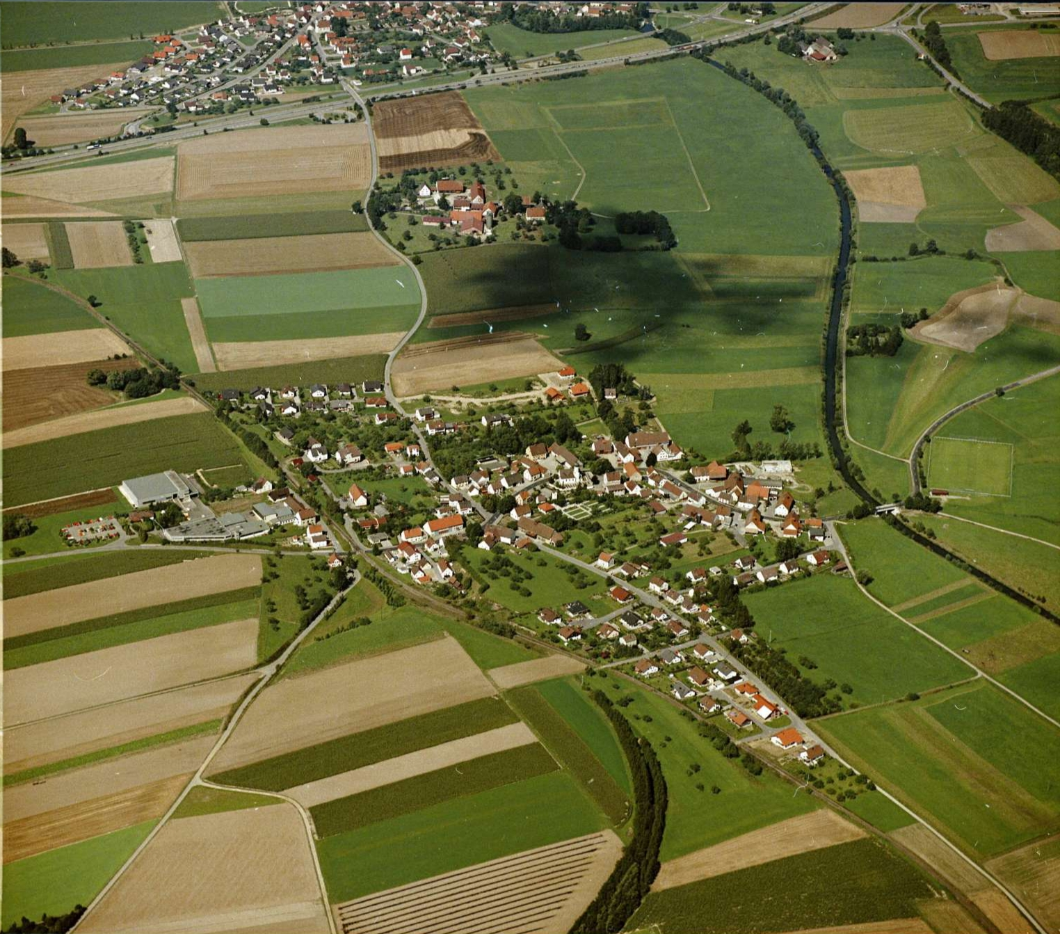 Bronnen (Achstetten) Nutzungsbedingungen ausdrücklich auch für Wikipedia (siehe: [1]